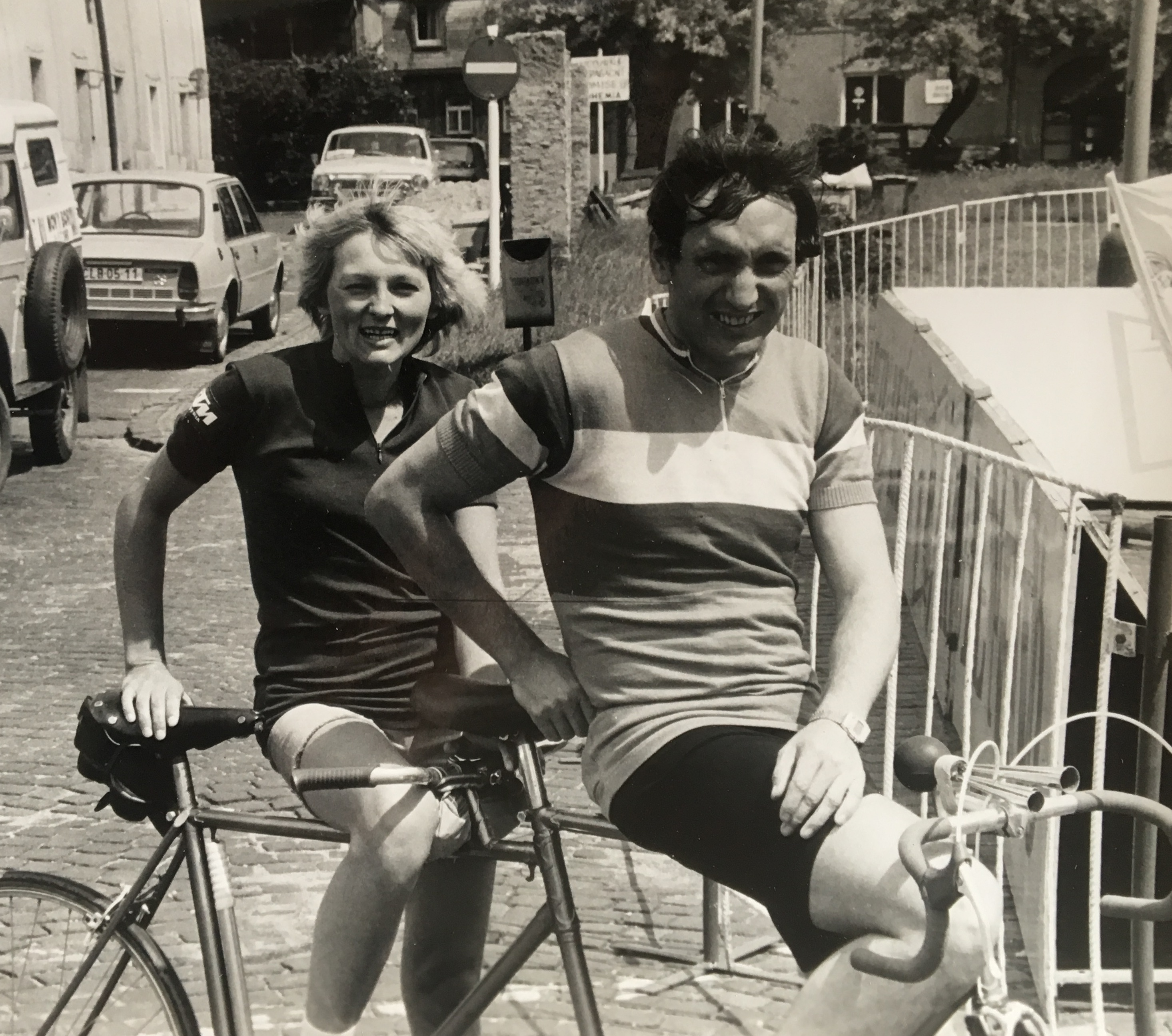 Petr Hladík a jeho žena Miroslava Hladíková, 1981